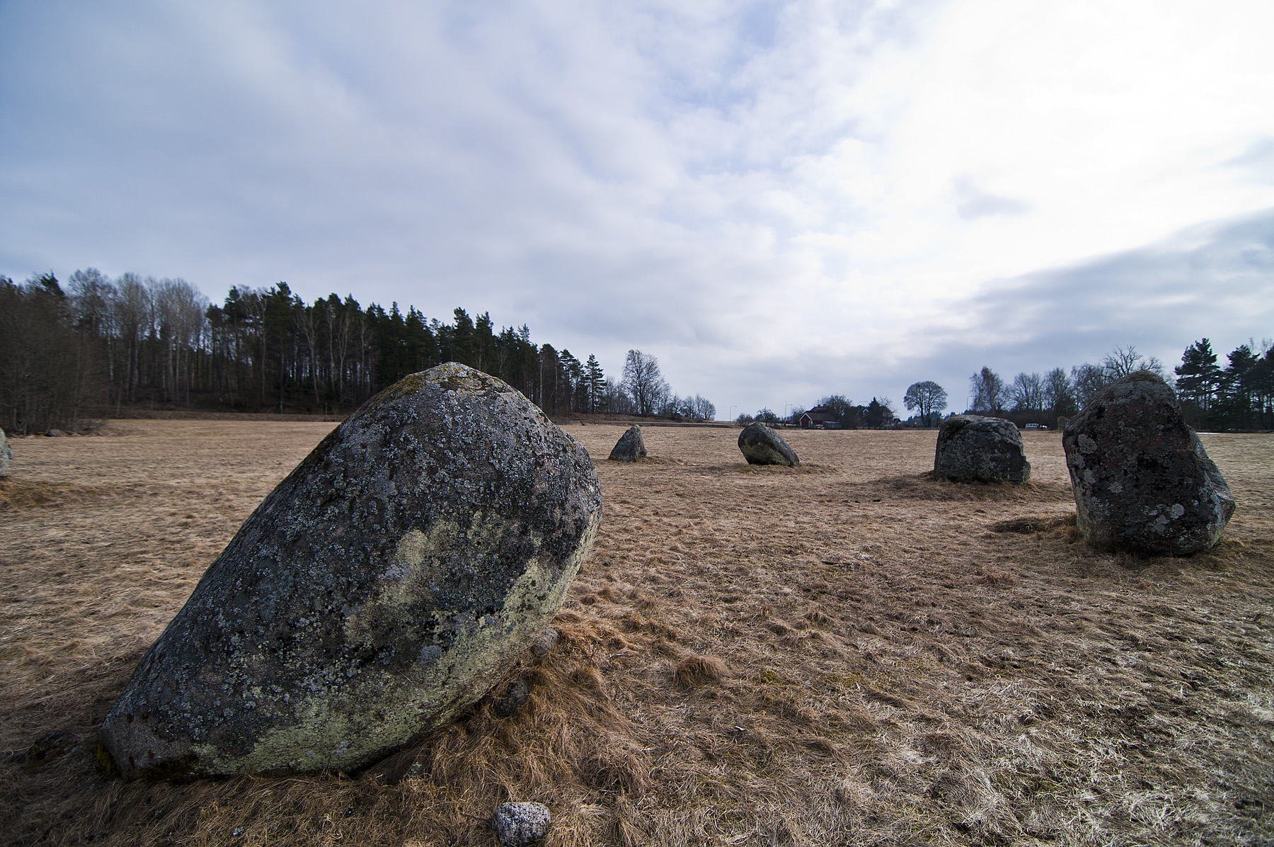 Restaurerad domarring, grav från järnålder.